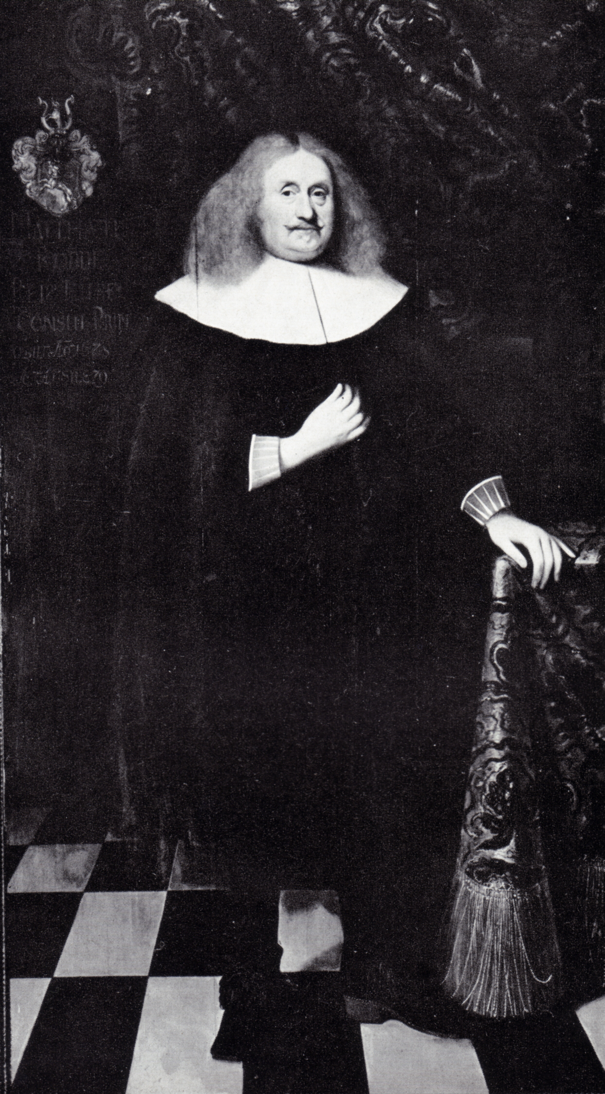 Portrait de 1669 de Matthäus Rodde (1603-1671), maire de Lübeck.